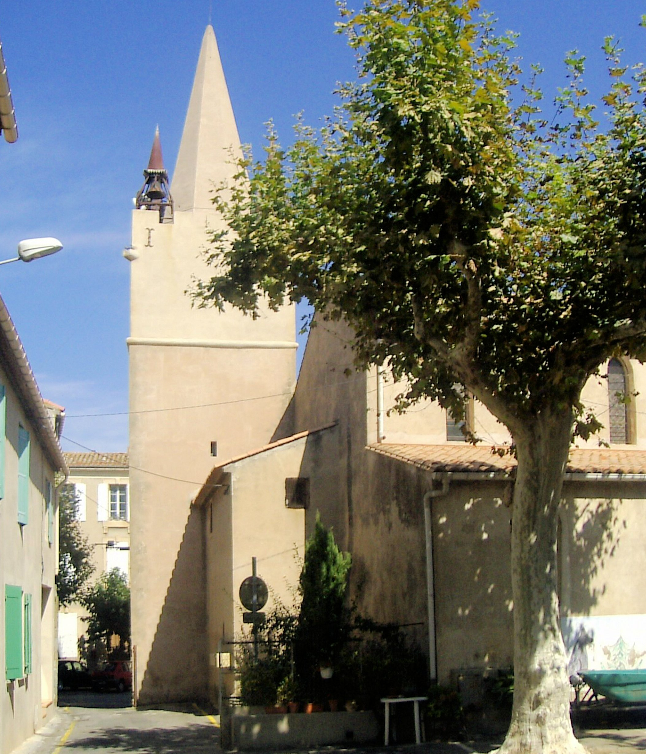 L'église Saint-Roch à Sallèles-d'Aude